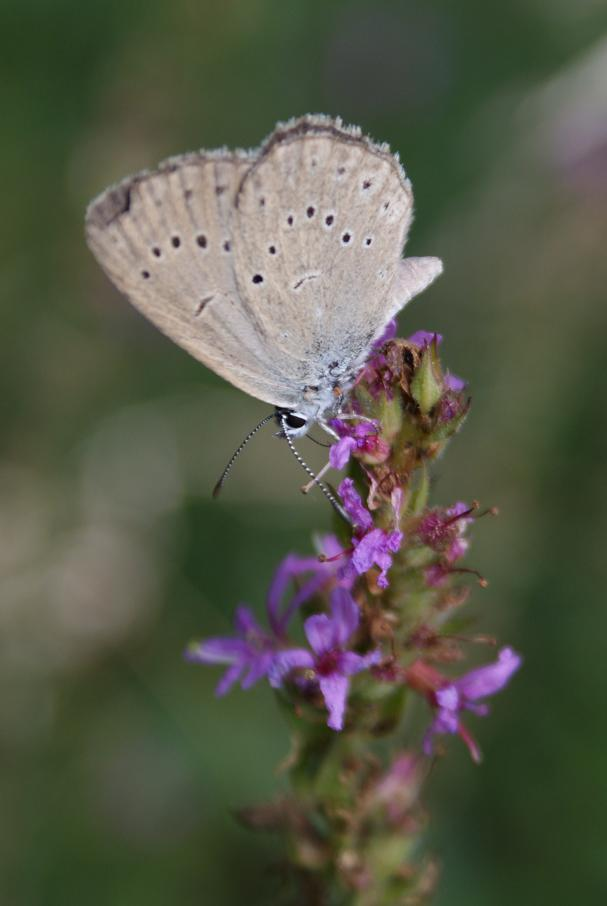 Modraszek telejus siedzący na krwawnicy pospolitej